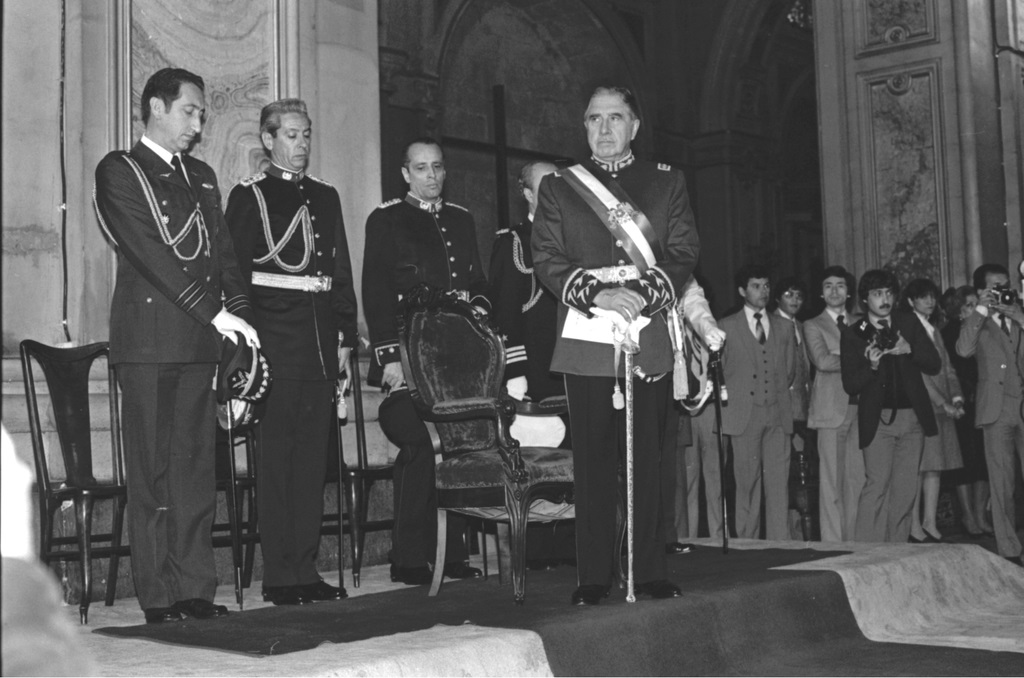 Augusto Pinochet Ugarte. Durante la ceremonia del tradicional tedeum de fiestas patrias.